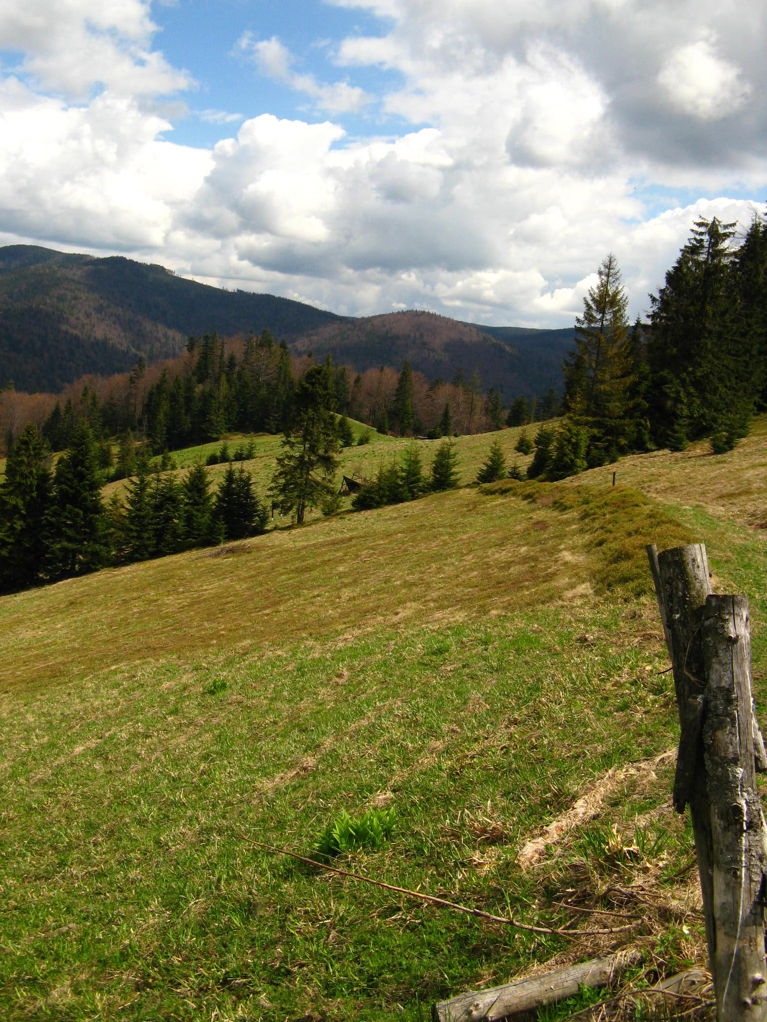 Polana Turbaczyk położona na terenie Gorczańskiego Parku Narodowego